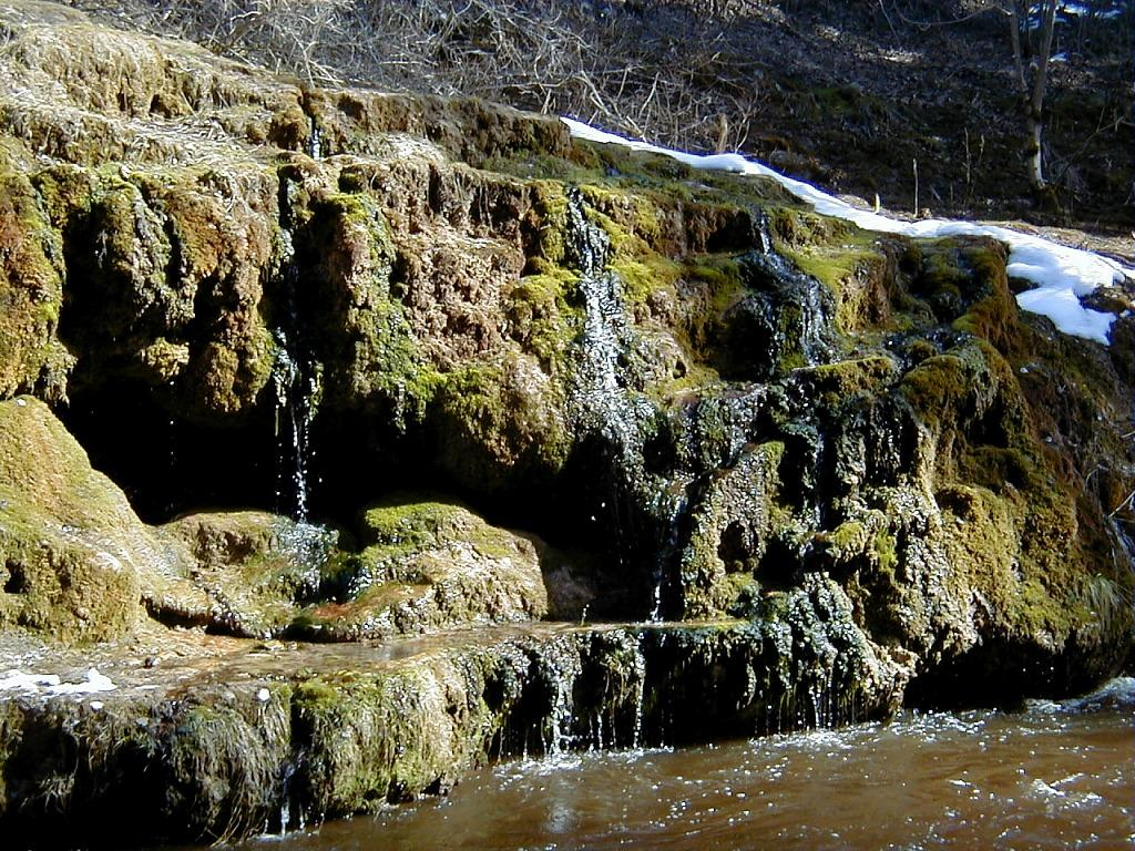 Raunas Staburags 2000-03-26